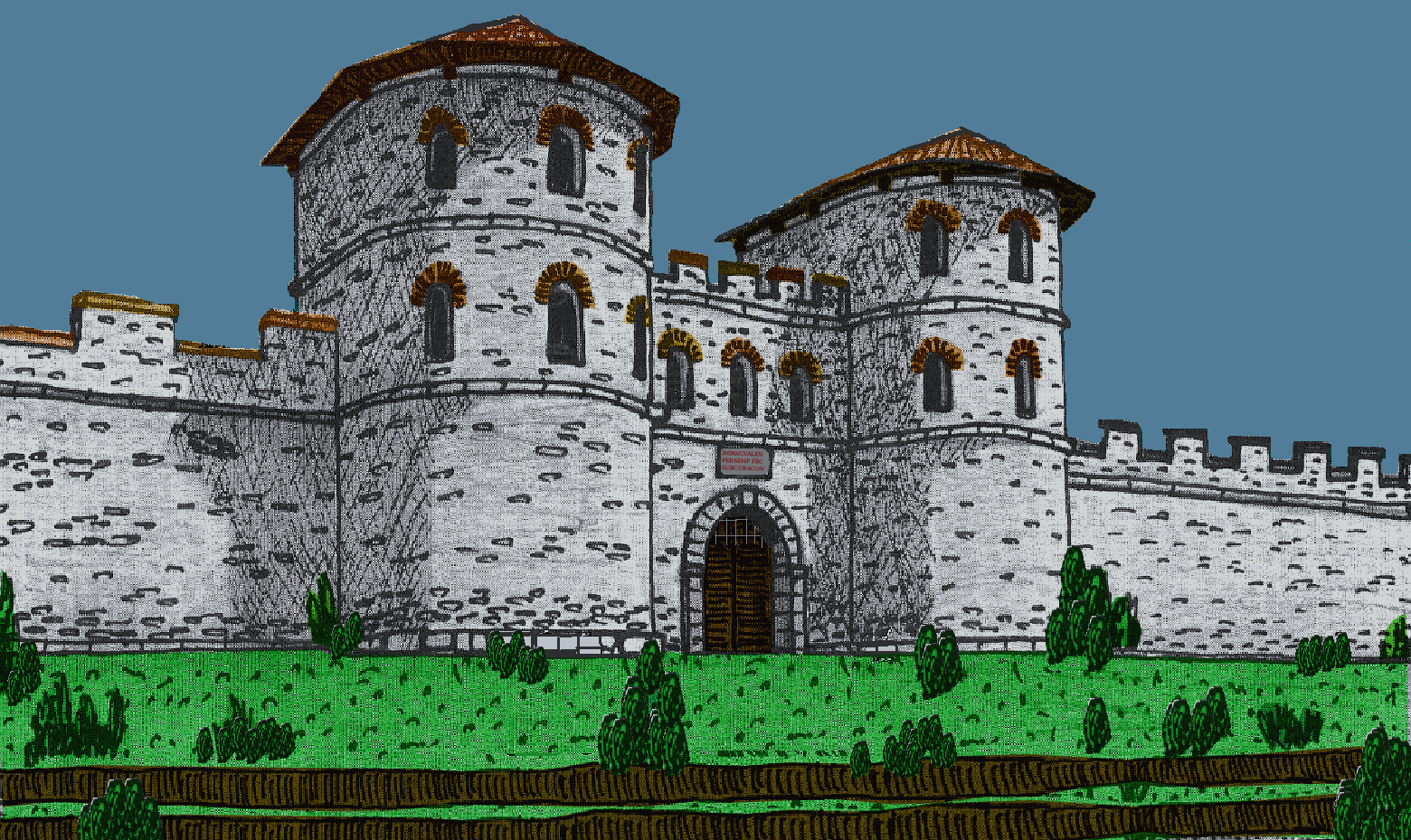 Rekonstruktionsversuch des Osttores von Kastell Kellmünz (D), Zustand im 4. Jahrhundert n.Chr.